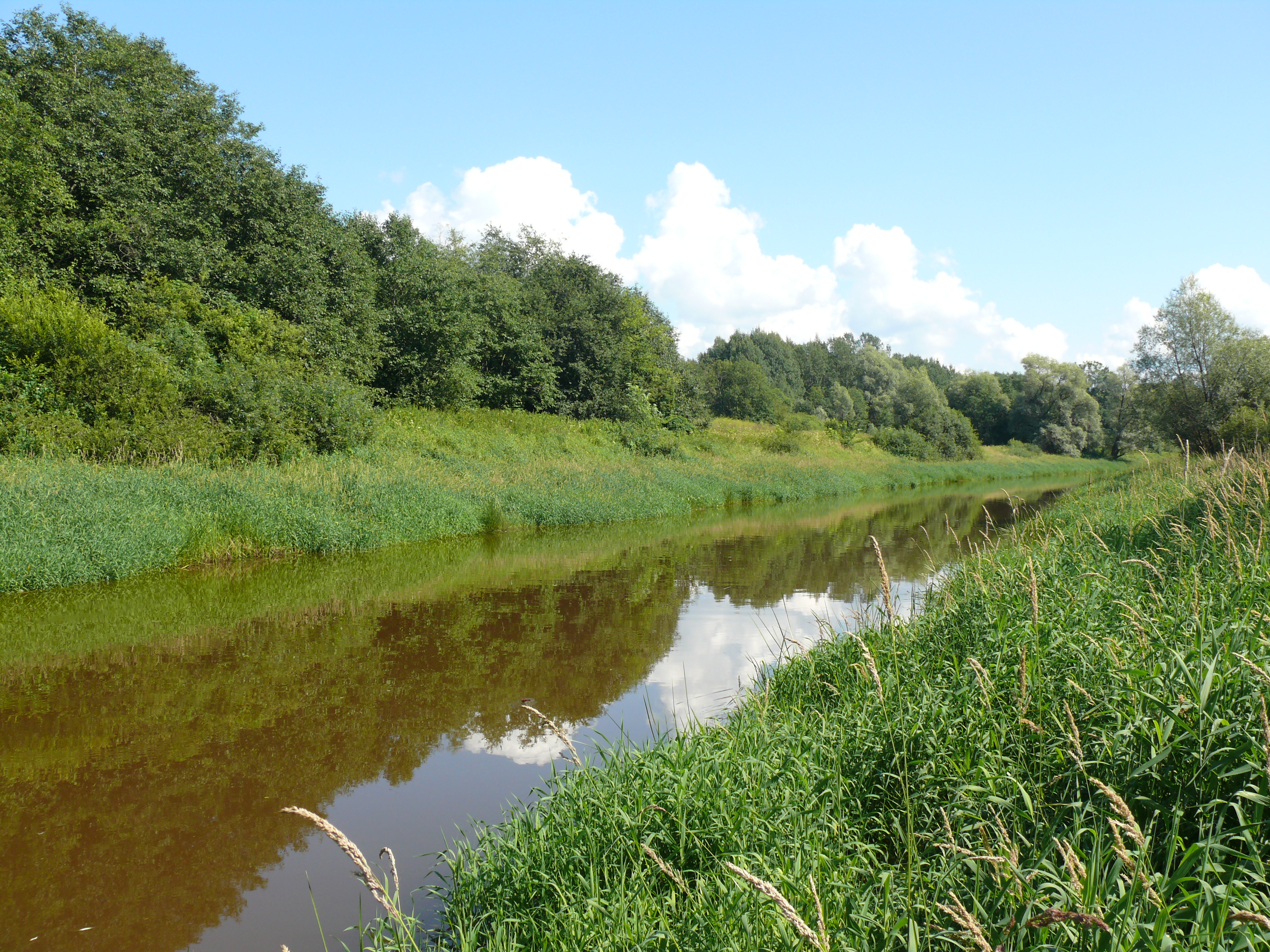 Вишерский канал. Новгородский район Новгородской области